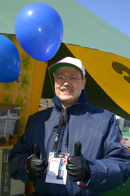 Markku from Finland in Helsinki during Eurovision 2007